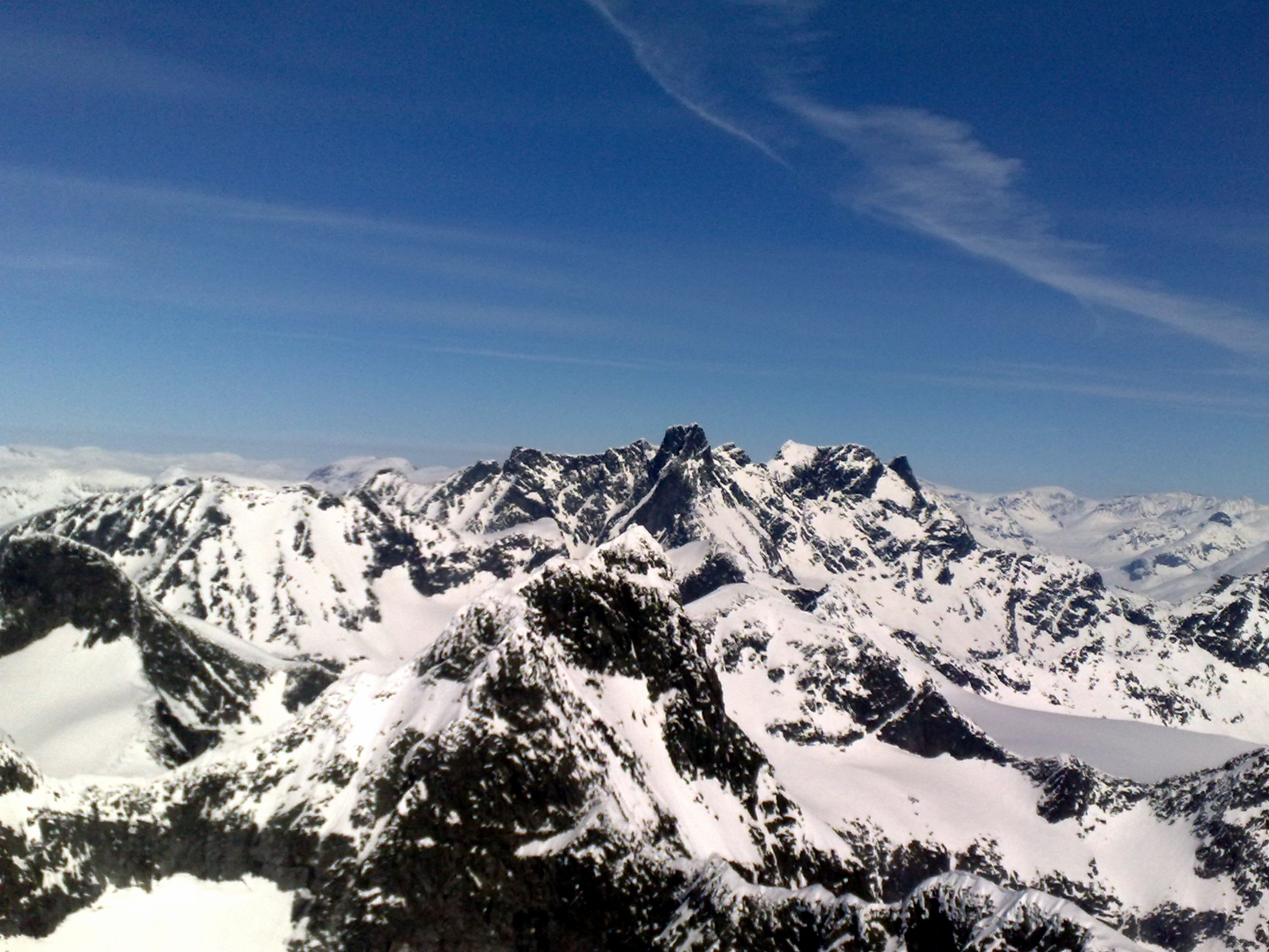 Jotunheimen sett frå fly